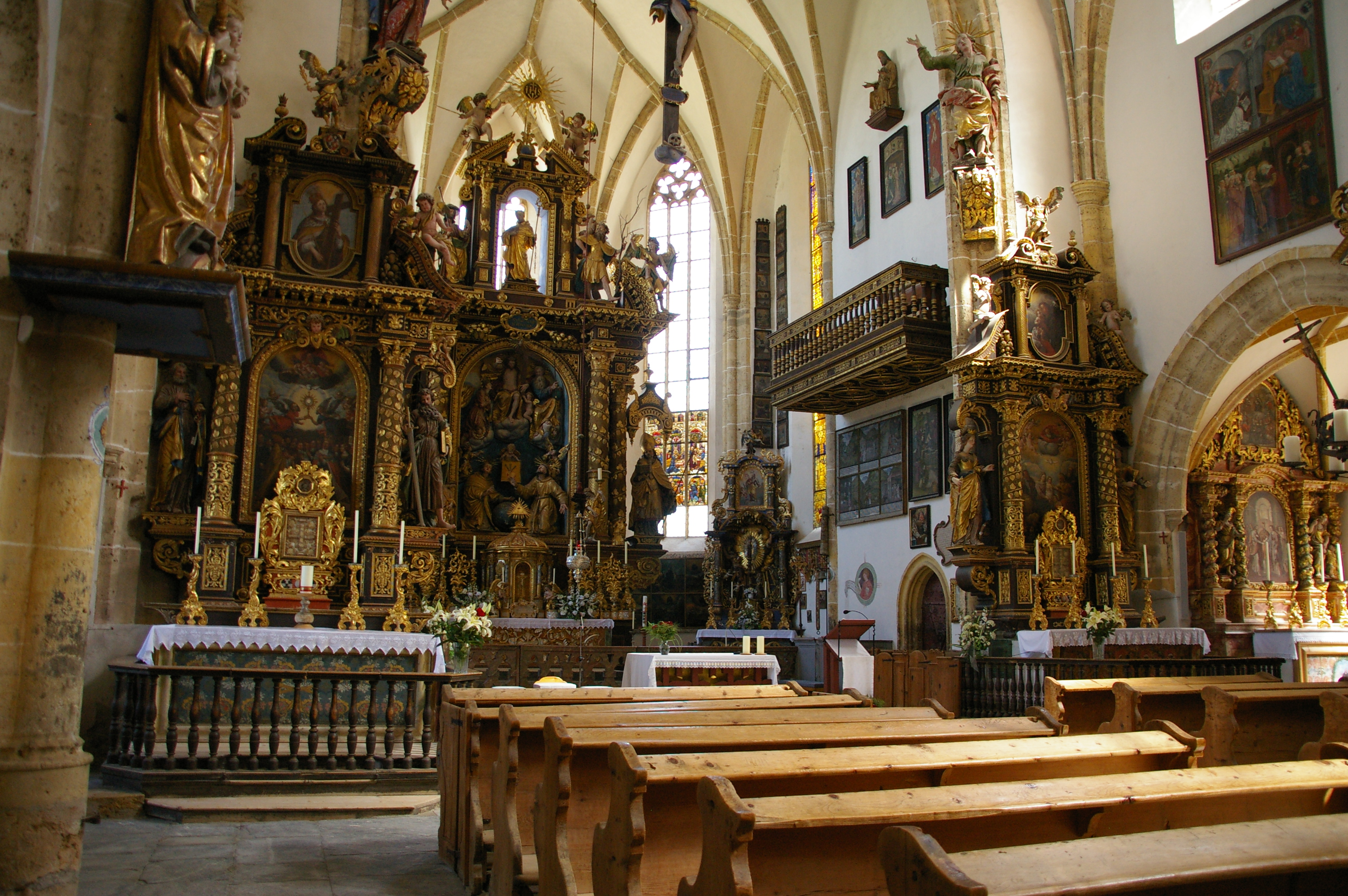 Wallfahrtskirche hl Leonhard; Tamsweg